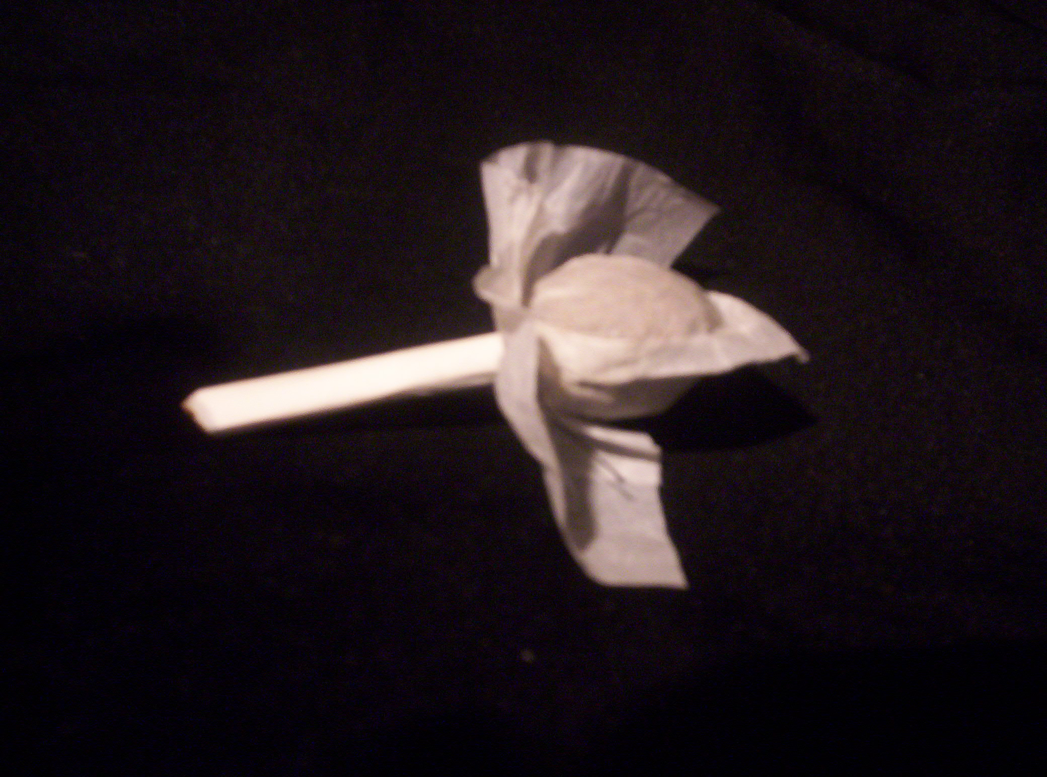 Exemple de roulage particulier : ici une tulipe : un long filtre figurant la tige, le cône décoré de feuilles imitant la forme de la fleur